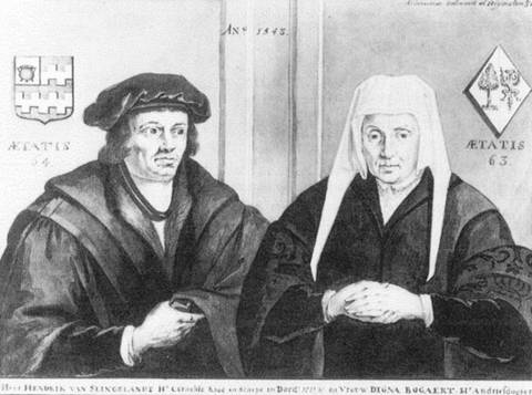 Heer Hendrick van Slingelandt Cornelis Hendrijckxz met zijn echtgenote Digna Bogaert